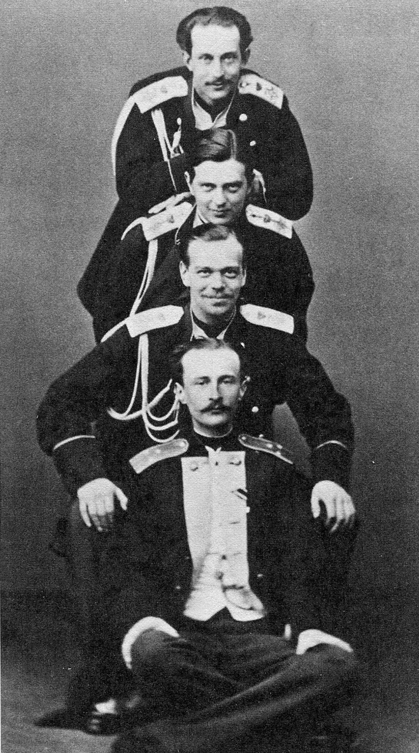 Цесаревич Александр Александрович с родственниками. Сверху вниз: Николай Максимилианович Лейхтенберский (внук Николая I) вел. кн. Владимир Александрович (сын Александра II) цесаревич Александр Александрович (сын Александра II) герцог Альберт Саксен-Альтенбургский